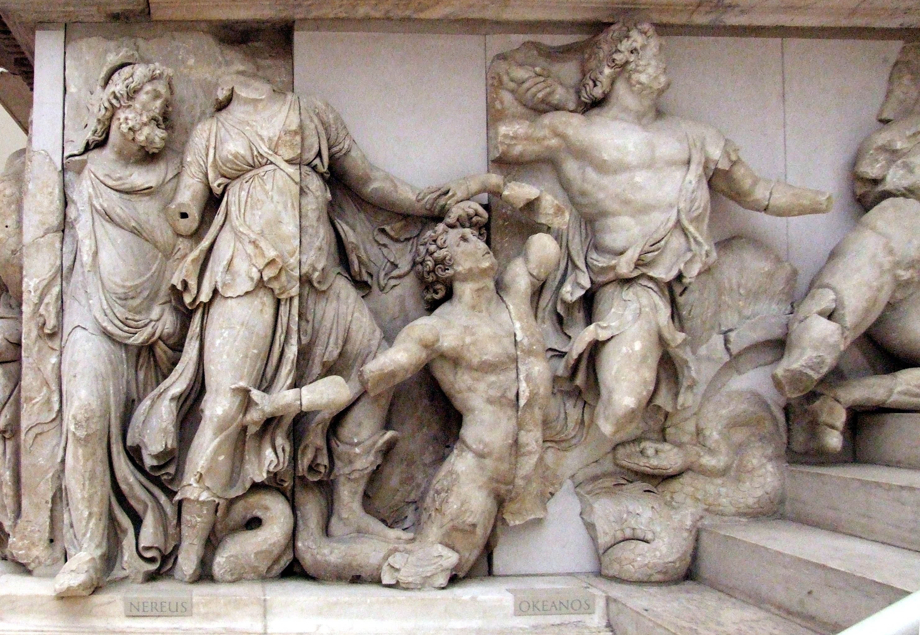 Pergamonmuseum Berlin, Pergamonaltar, Gigantomachie, Nereus, Doris, Okeanos contra Giganten